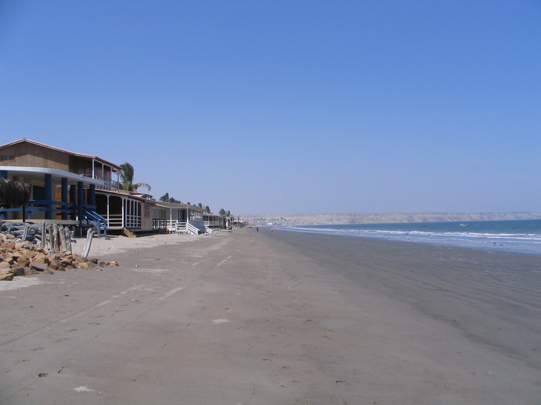 Litoral de Colan